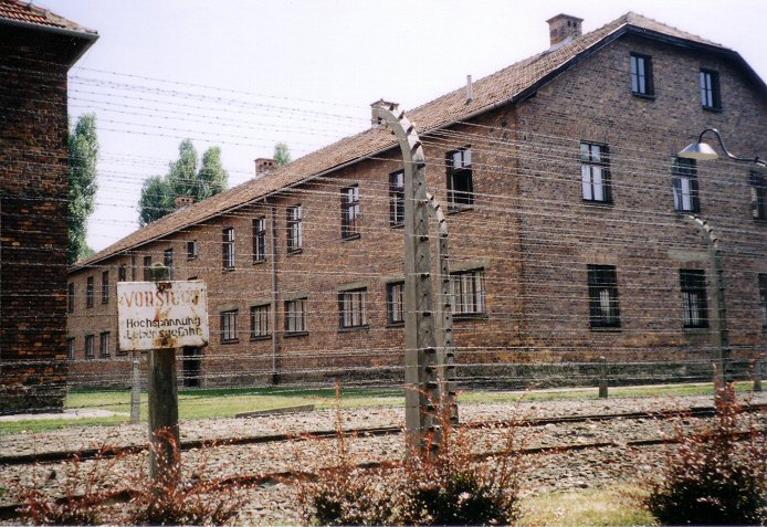 Barak en terreinafscheiding. Eigen foto, juli 2003